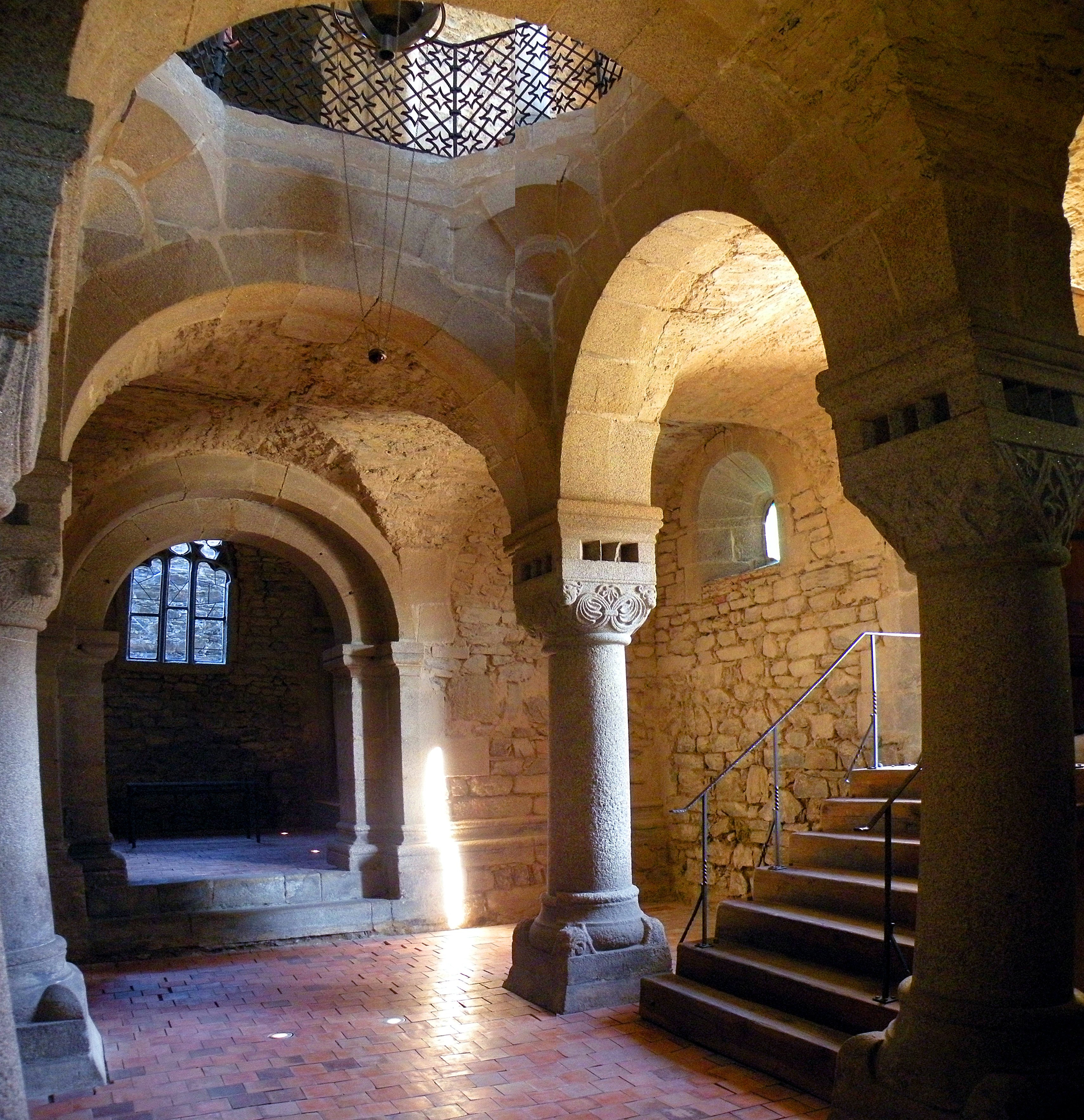 Егер (Хеб).Капелла.Первый этаж